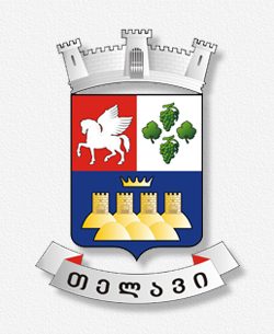 თელავის მუნიციპალიტეტის გერბი